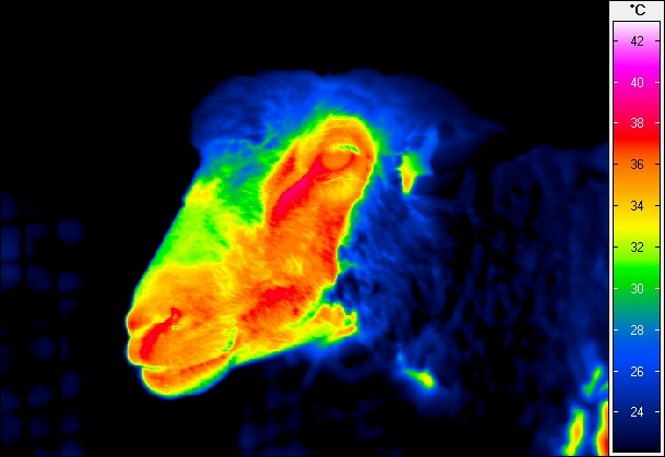 Termogram owcy